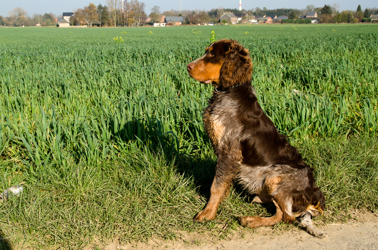 Notre épagneul picard, Gibbs des Chaumes de Thiérache à 6 mois